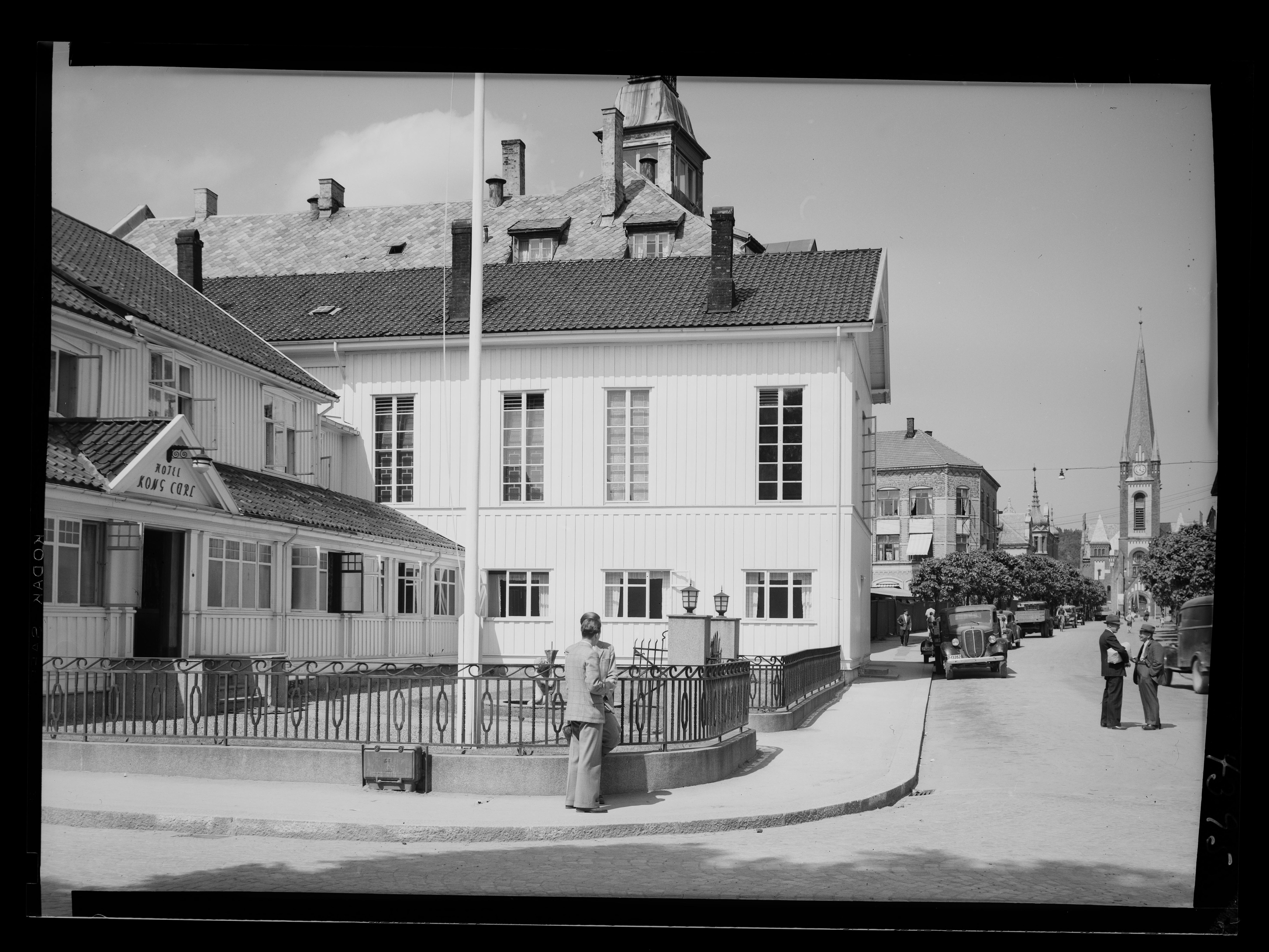 Bildet er hentet fra Nasjonalbibliotekets bildesamling. Anmerkninger til bildet var: Fotograf:Ukjent Sandefjord, Sandefjord, Vestfold